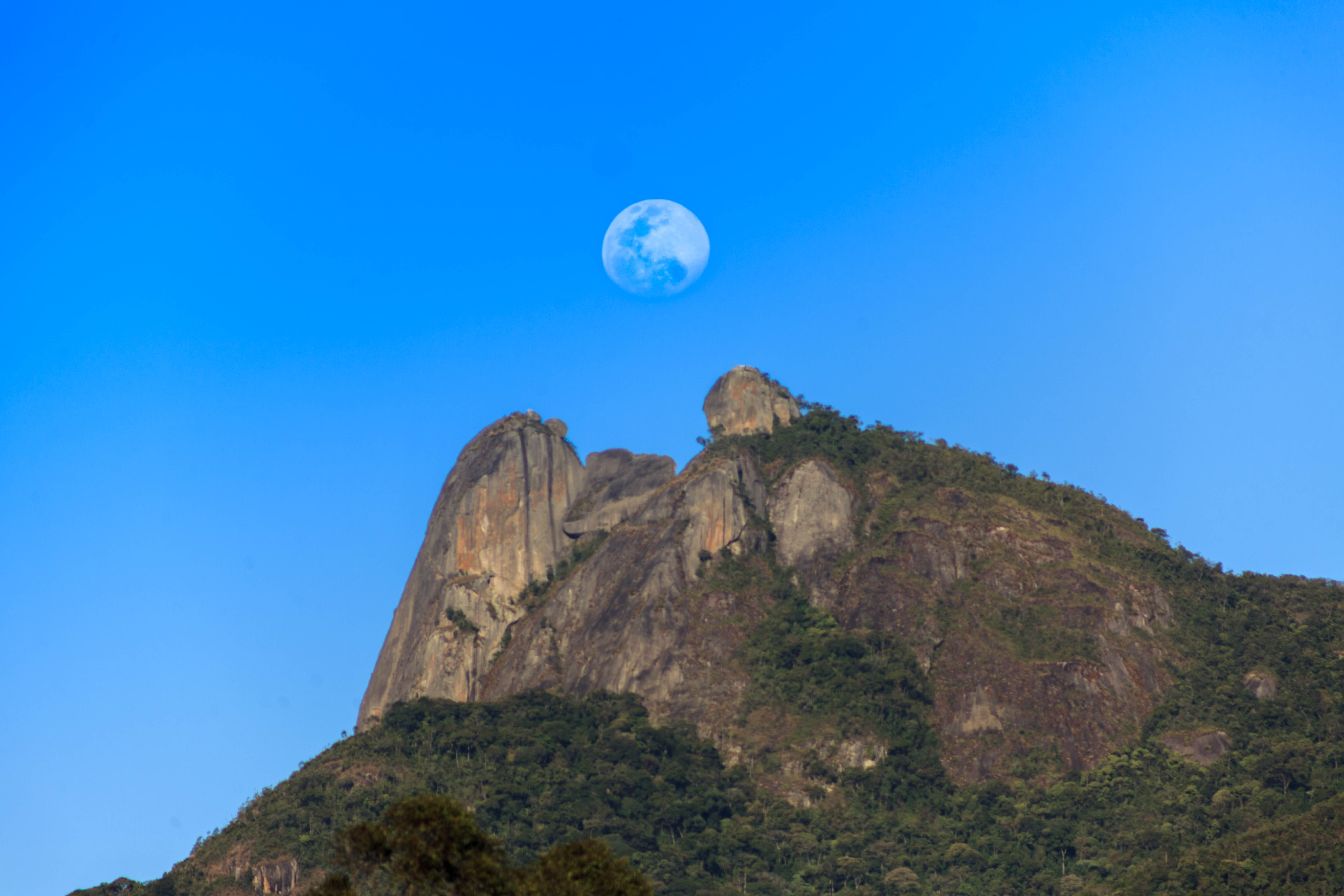 Lua cheia nascendo na pedra selada